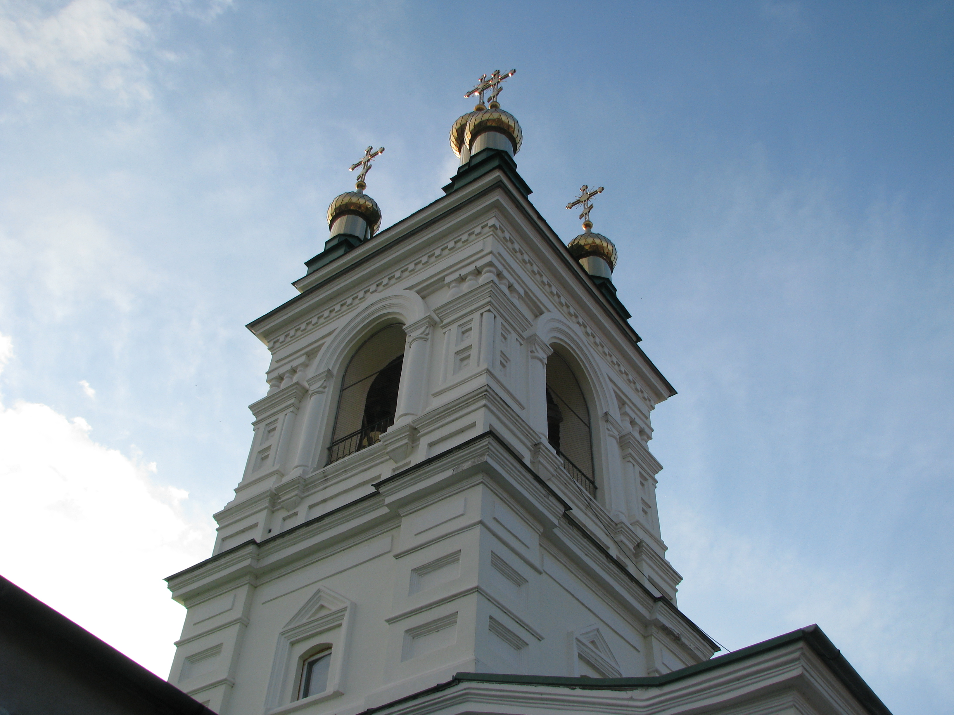 Миколаївська церква та дзвіниця, Кілія, вул. Дунайська, 4